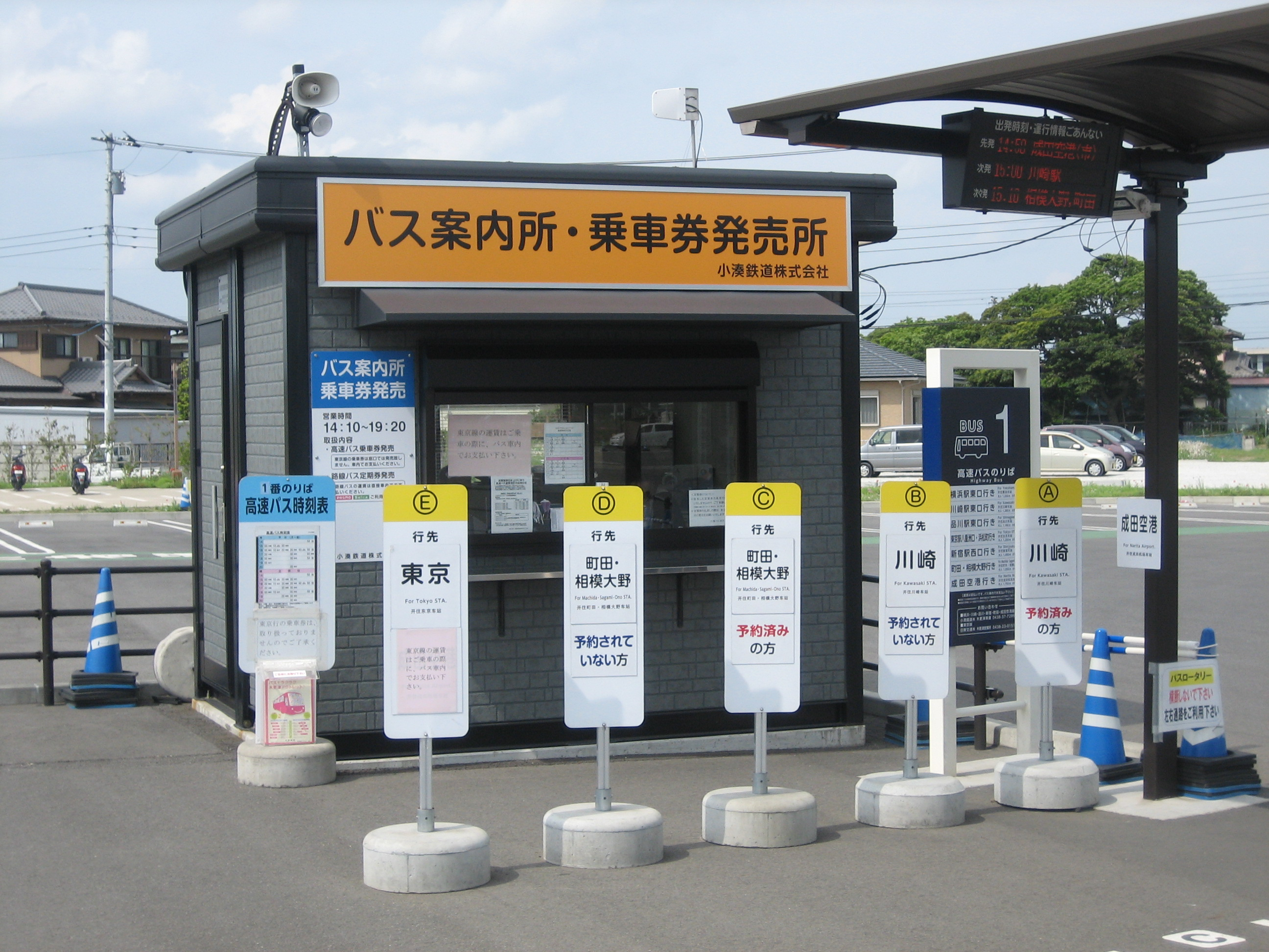 三井アウトレットパーク木更津のエリア内にあるバス案内所及び乗車券販売所